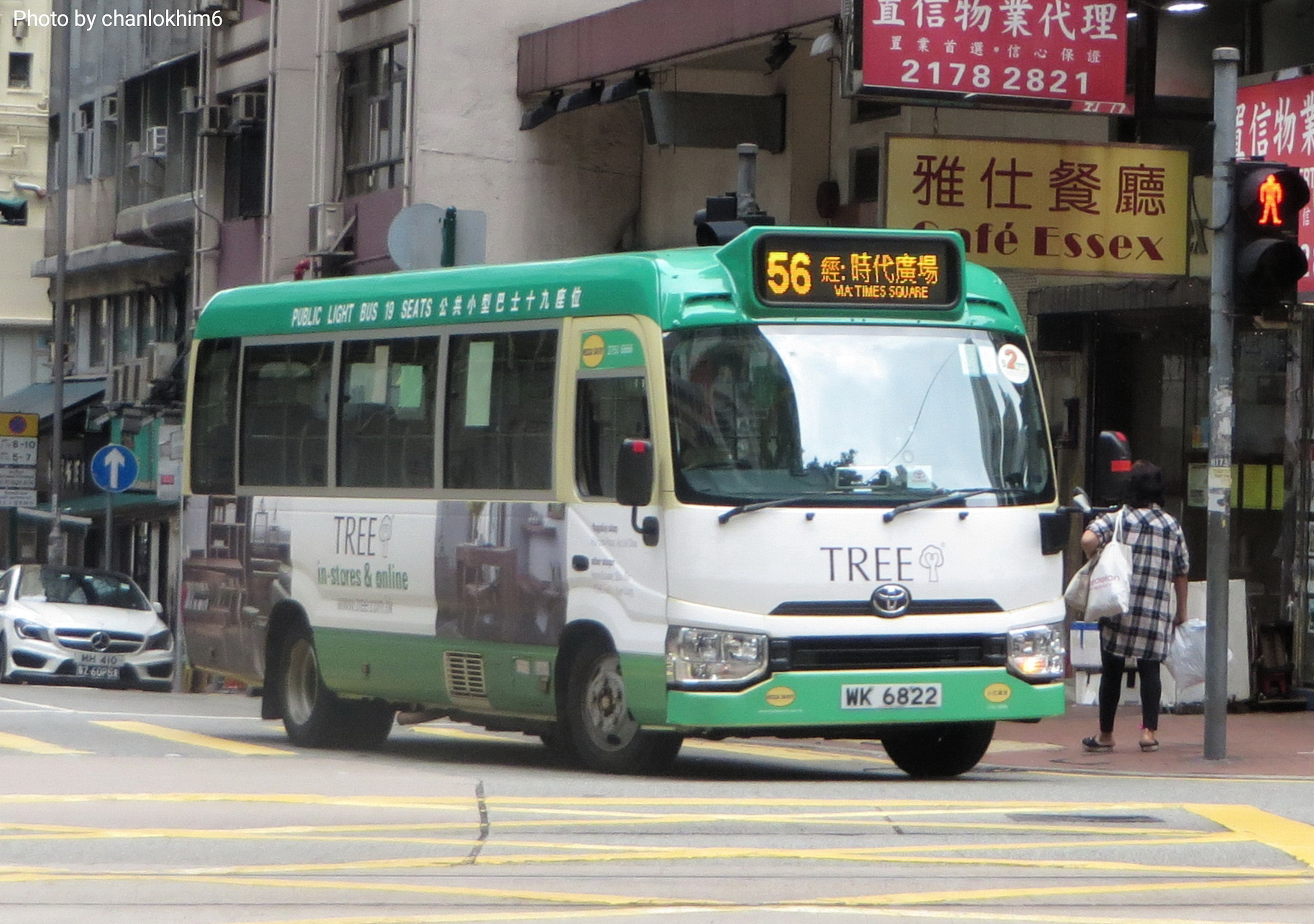 小巴WK6822的照片